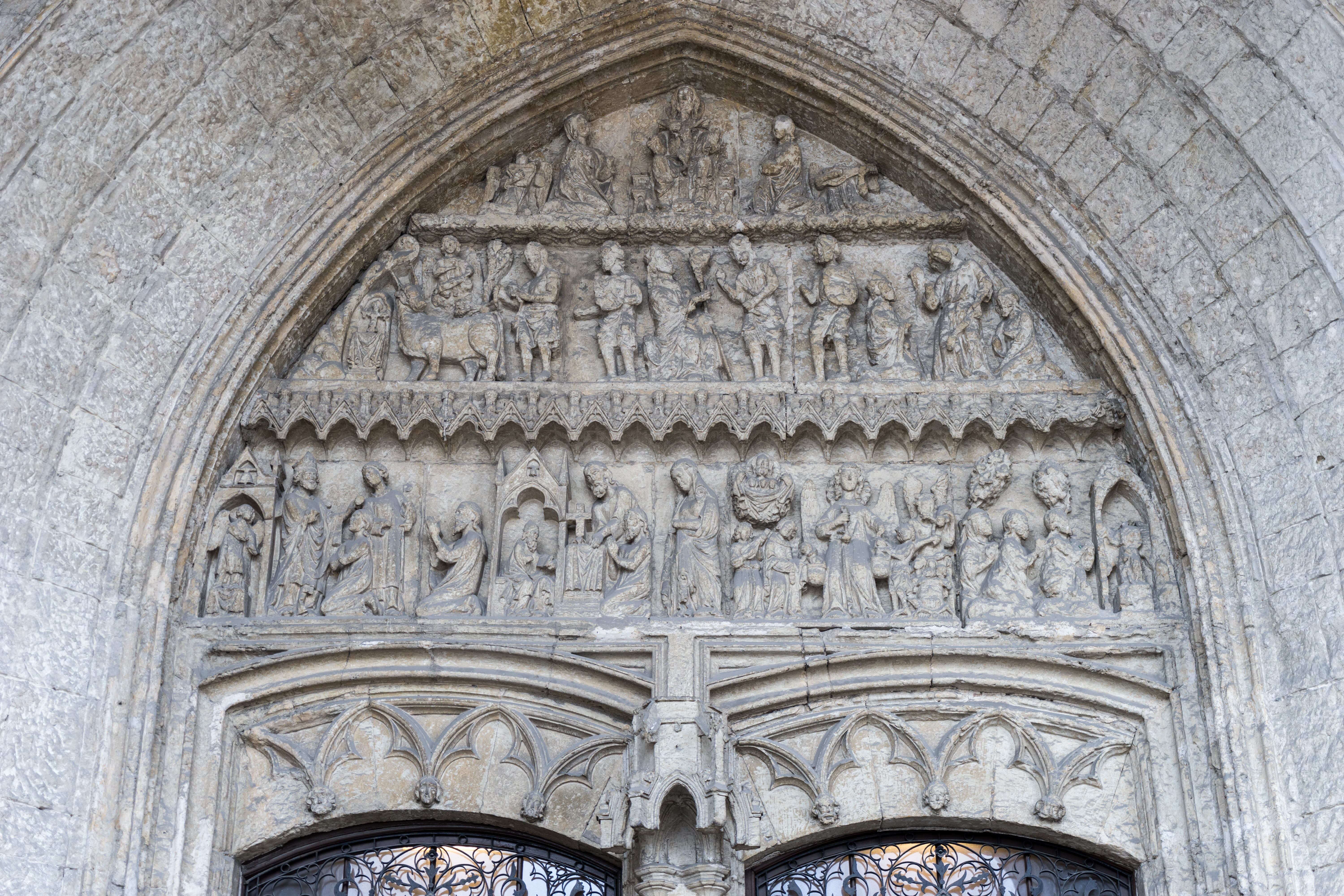 Vitoria-Gasteiz - San Miguel - Portail